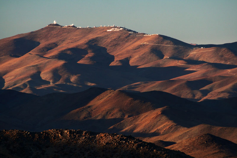 La Silla Observatory at sunrise.